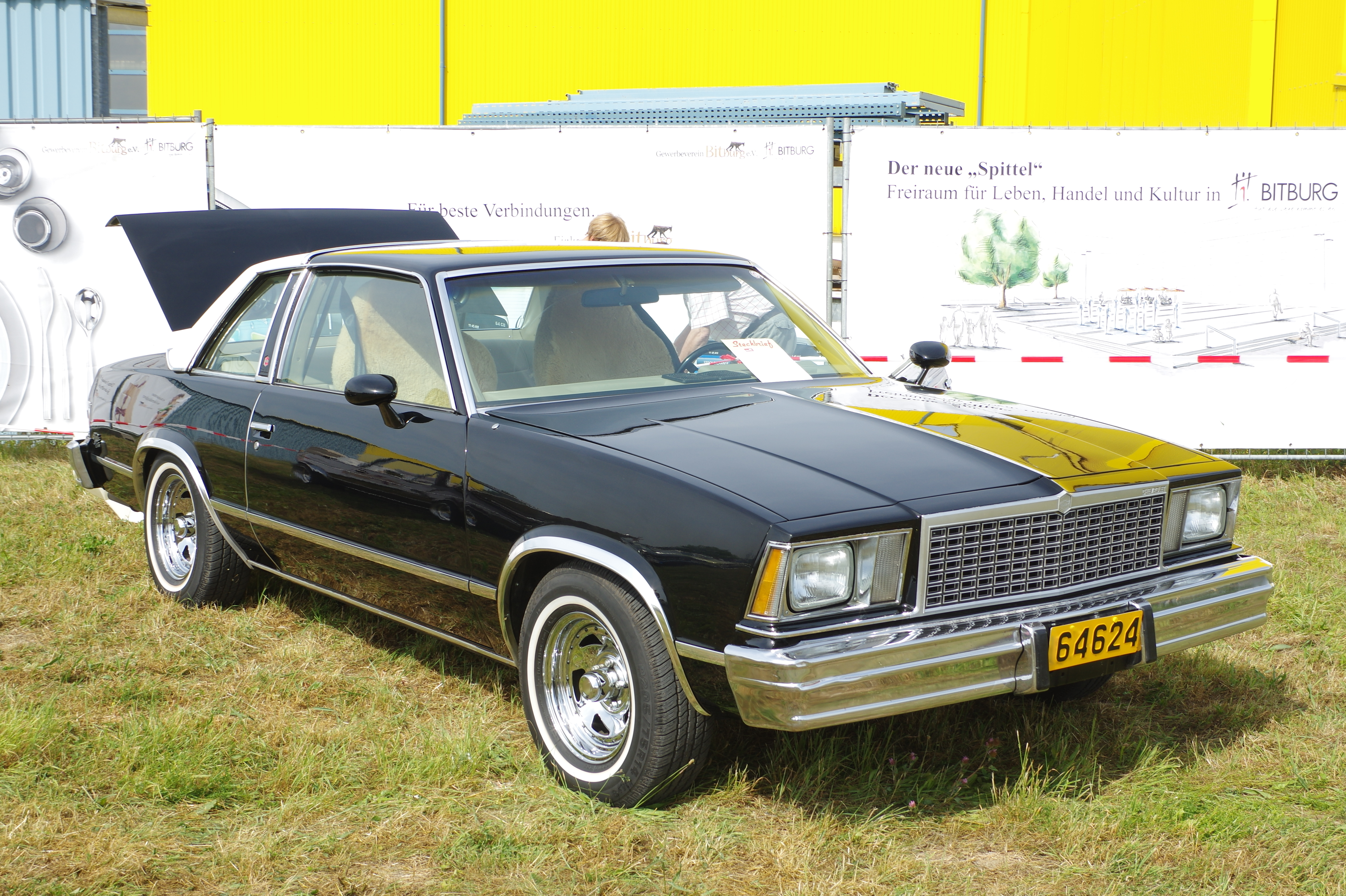 Chevrolet Malibu Landau, 1979, 3300 cm³, 74 PS , Bitburg Classic 2016, Das Nummernschild ist verfälscht!